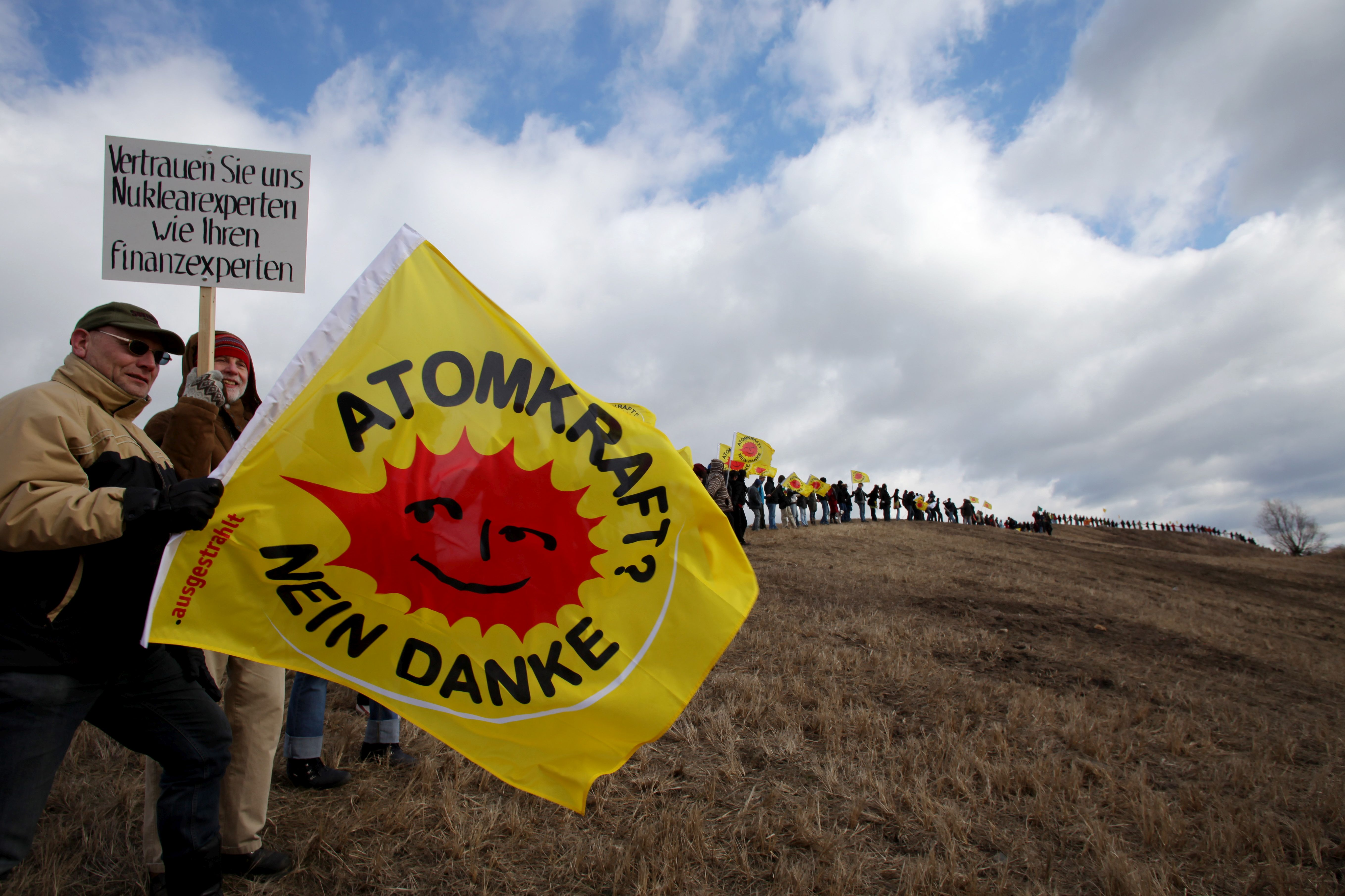 147.000 Menschen formen eine 120km lange Menschenkette zwischen Krümmel und Brunsbüttel, um ihre Forderung eines Ausstiegs aus der Atomkraft deutlich zu machen.